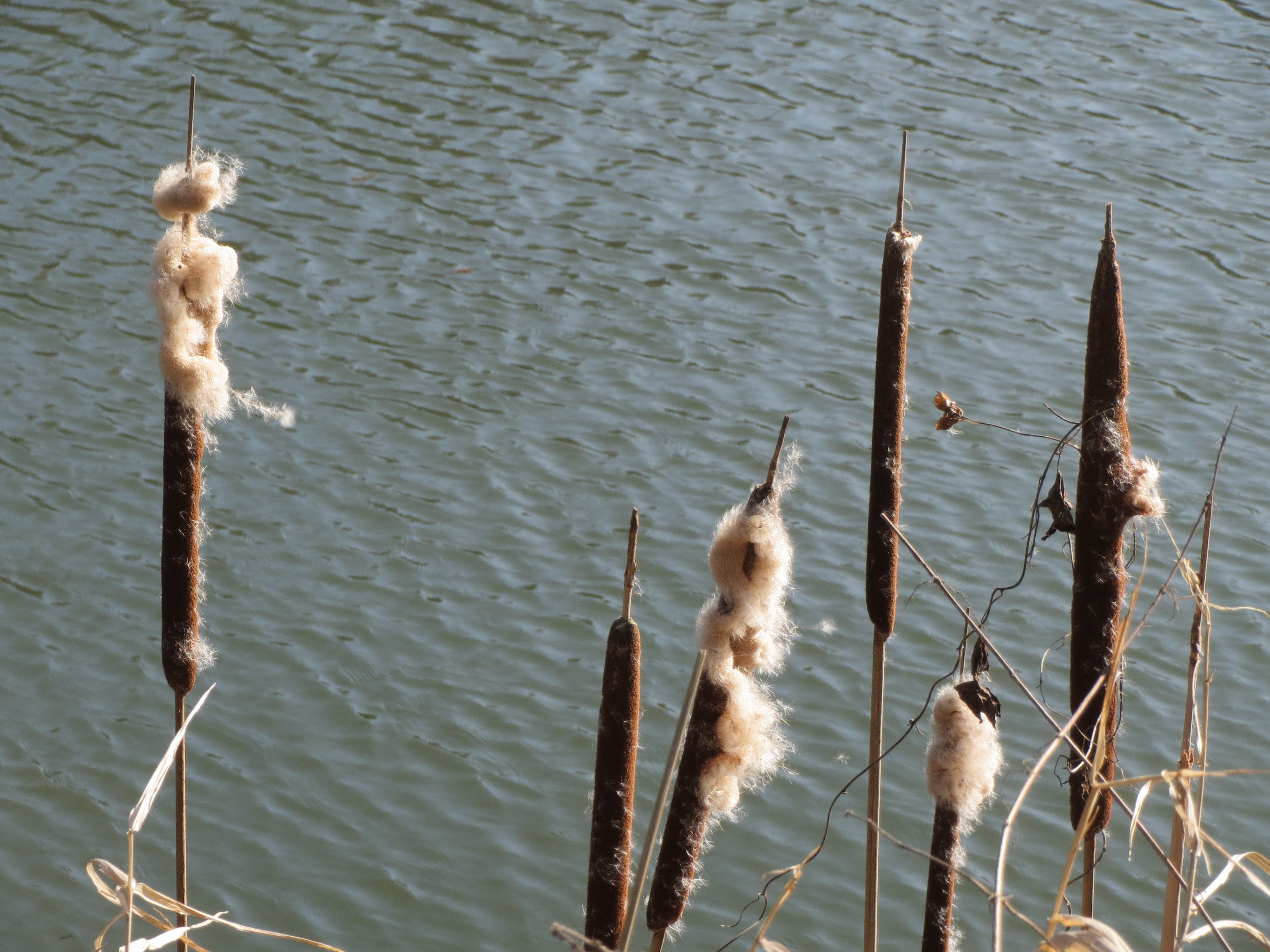 Breitblättriger Rohrkolben (Typha latifolia) an der Saar in Saarbrücken